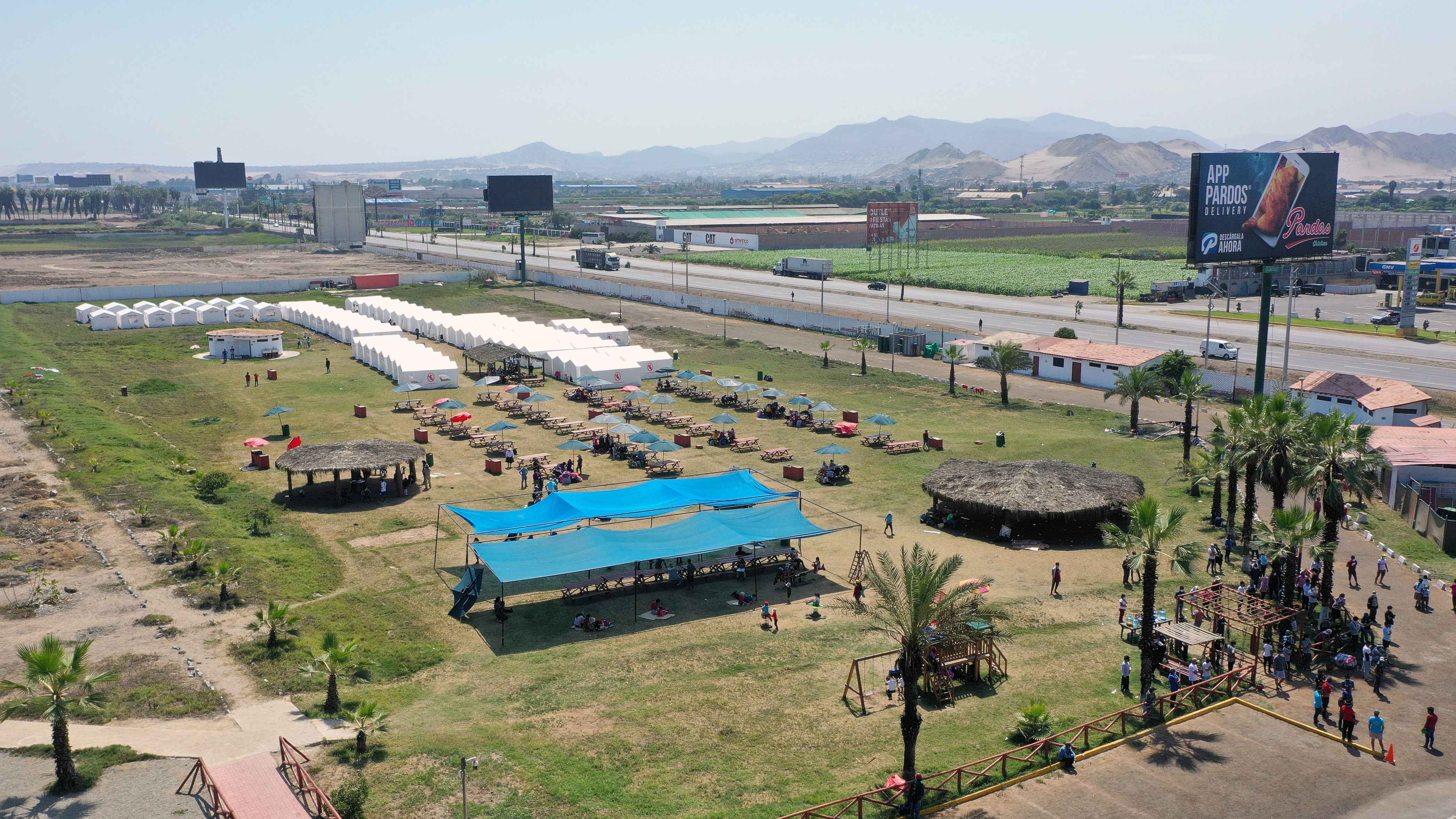 PERSONAS VULNERABLES FUERON TRASLADADAS A SU REGIÓN DE ORIGEN